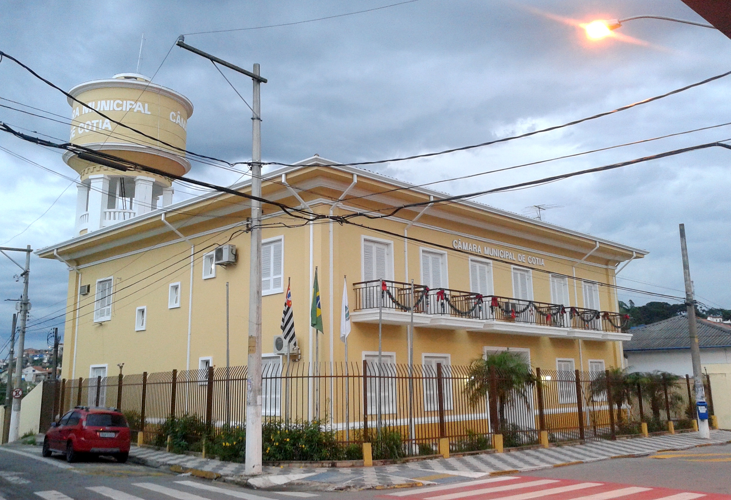 Câmara Municipal de Cotia, SP, Brasil.